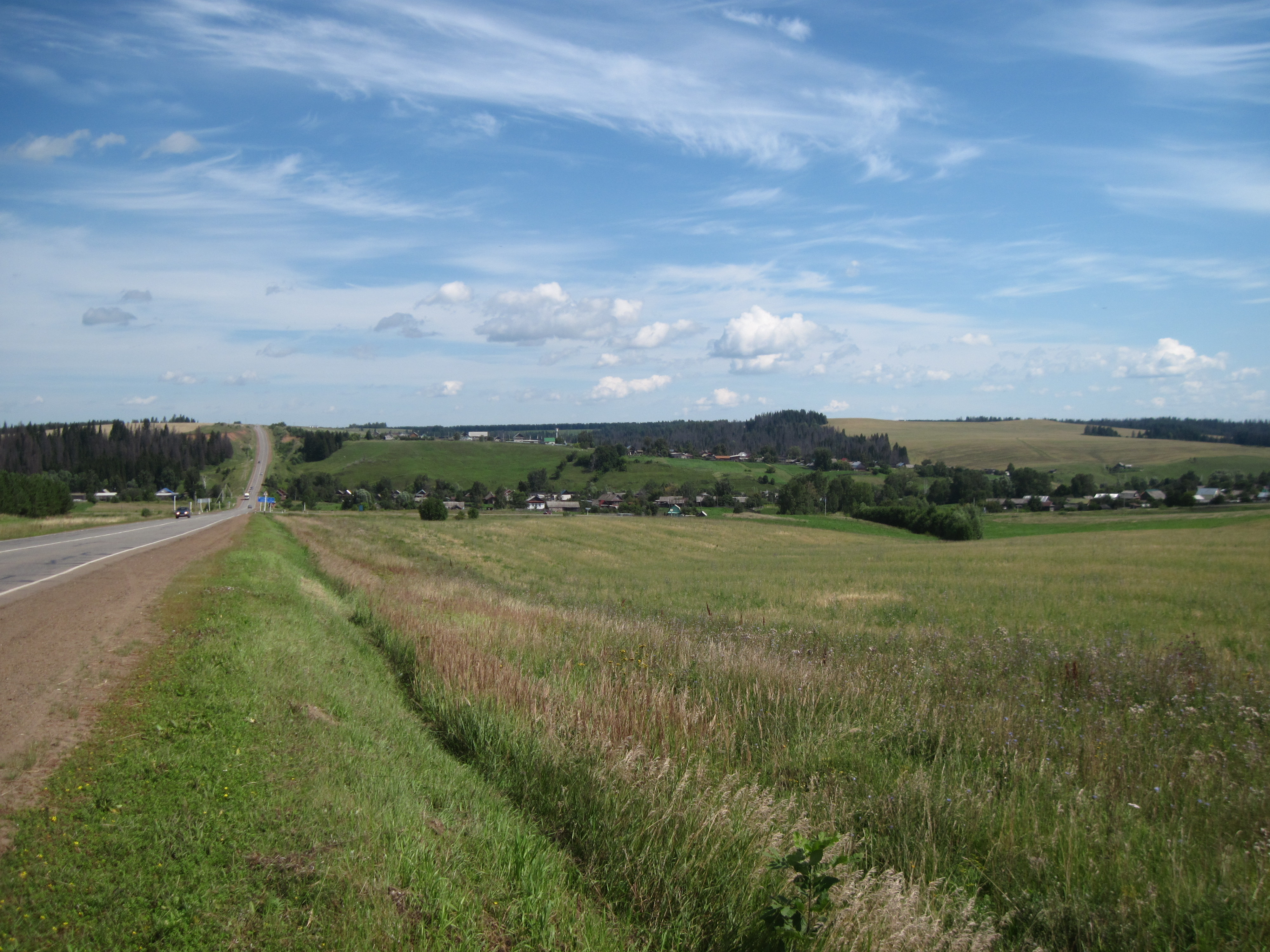 Вид с дороги Киясово-Сарапульский тракт